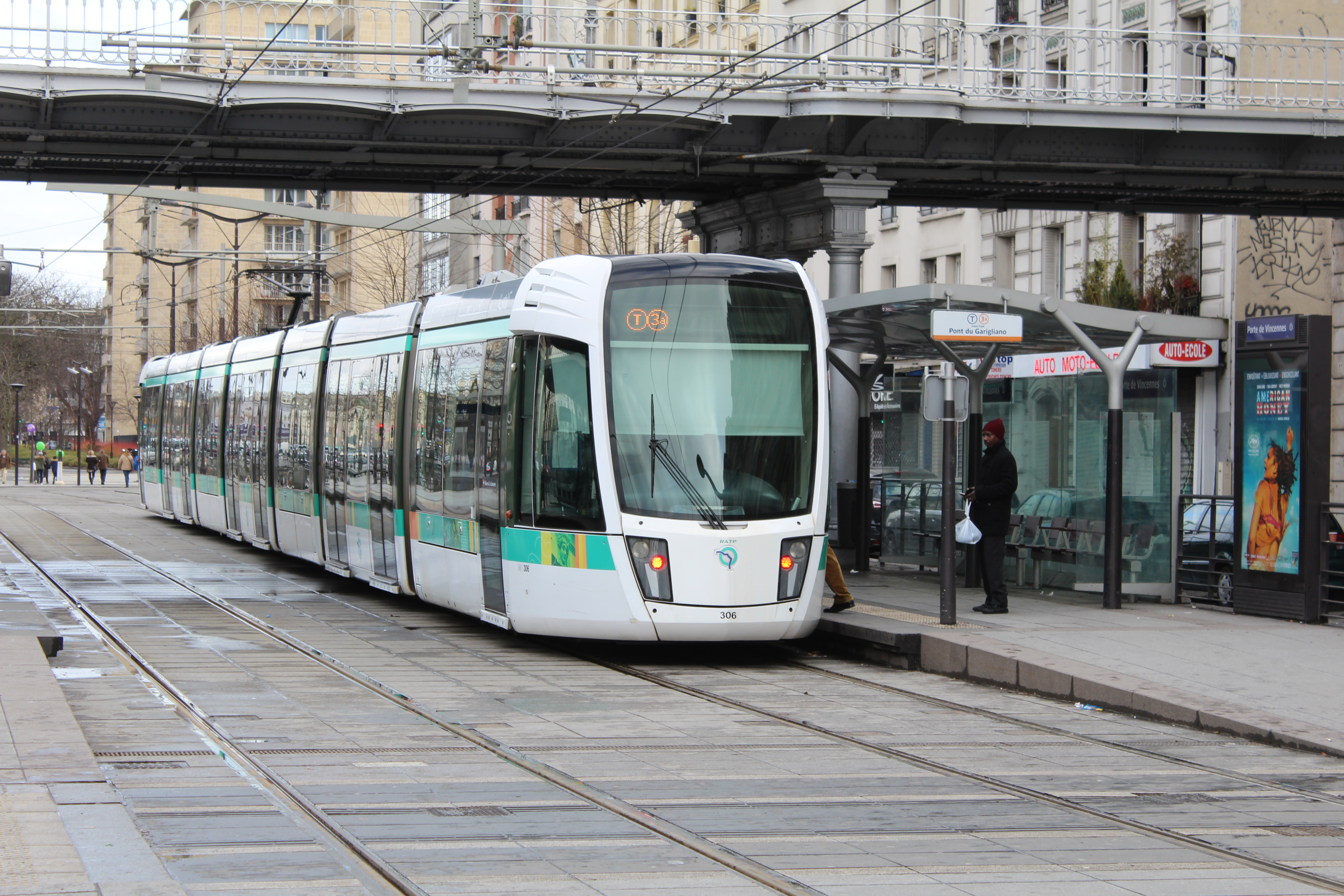 Station Porte de Vincennes de la ligne 3a du tramway d'Île-de-France.